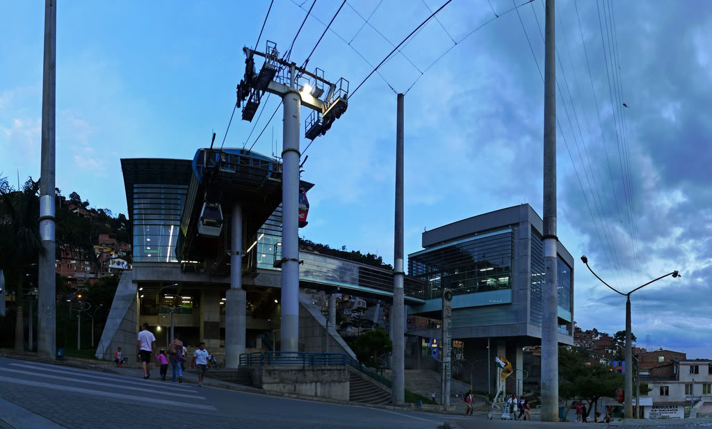 Estación Santo Domingo de Metro de Medellín